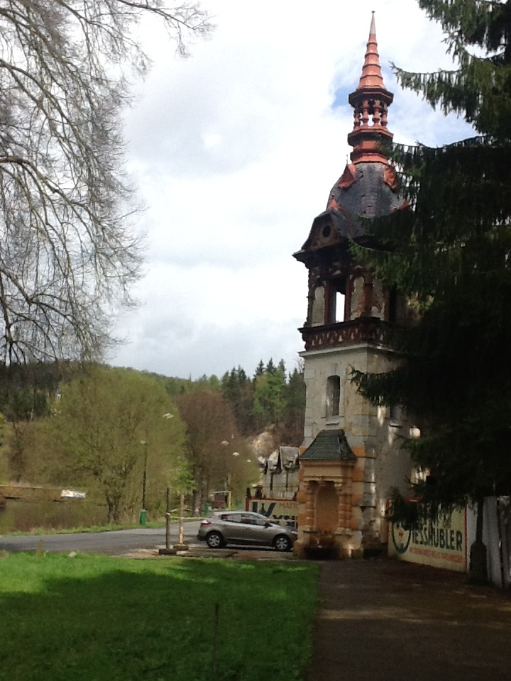 Jindřichův dvůr Lázně Kyselka 2014